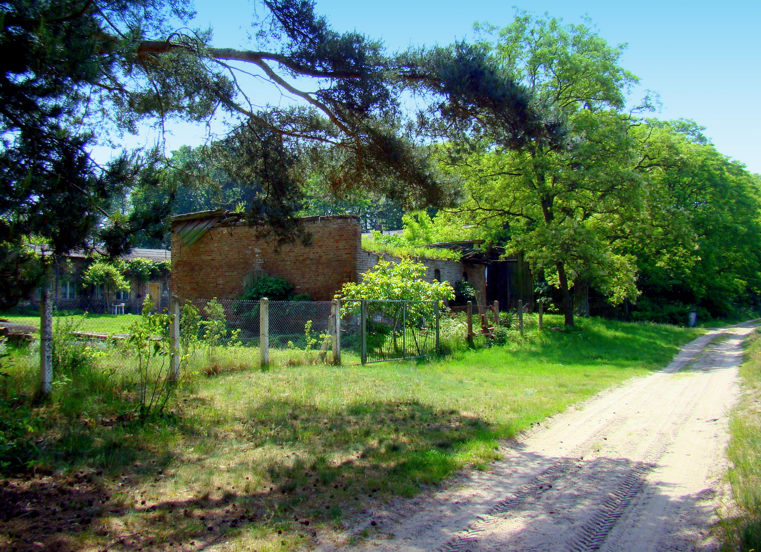 Maszkowo, część zabudowań (Gmina Nowe Warpno, Województwo zachodniopomorskie), Polska